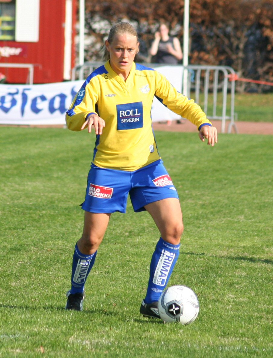 Fotballspilleren Ann Iren Mørkved